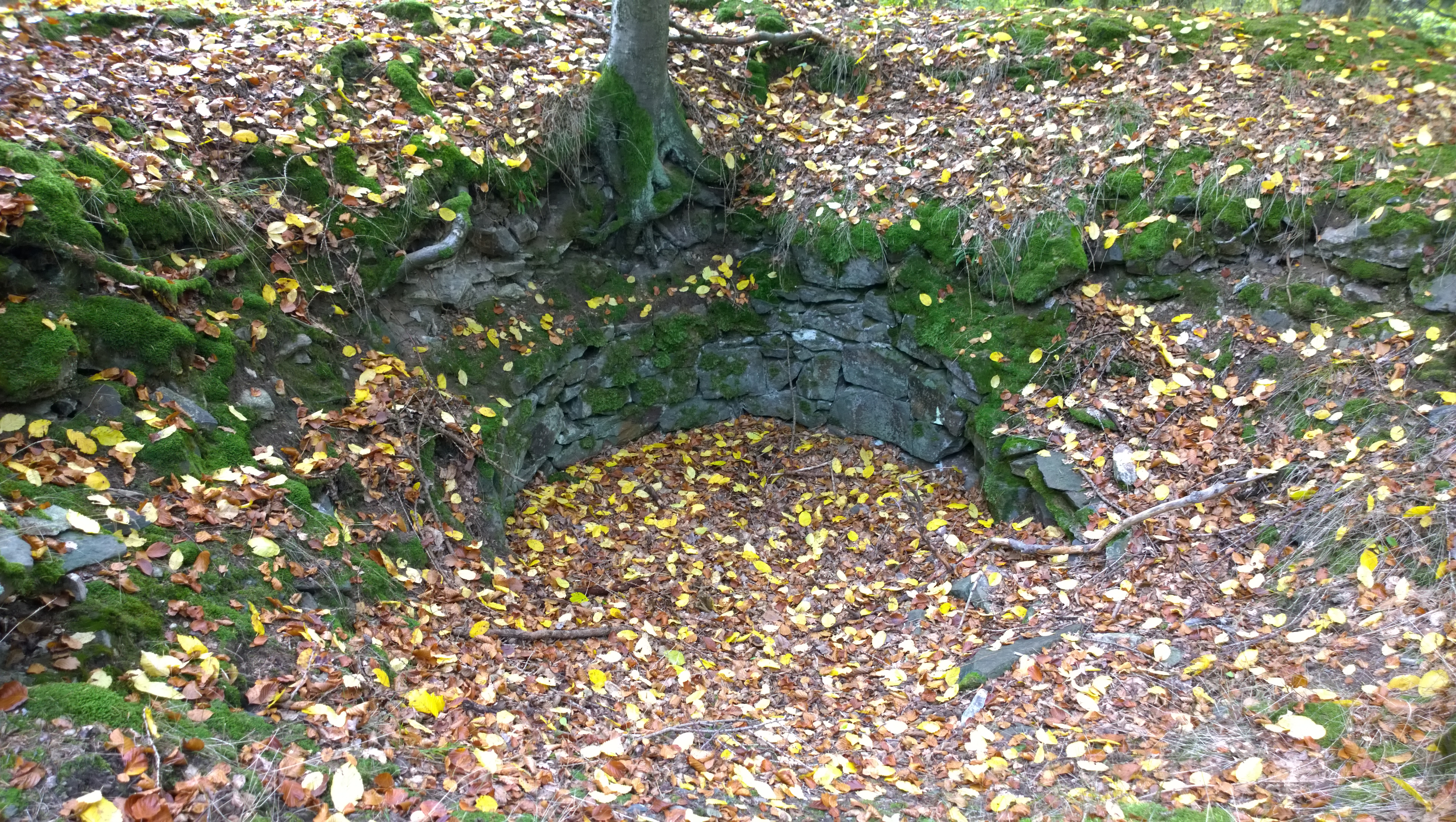 Als Bergfried-Rest angesprochen (Mittelteil)